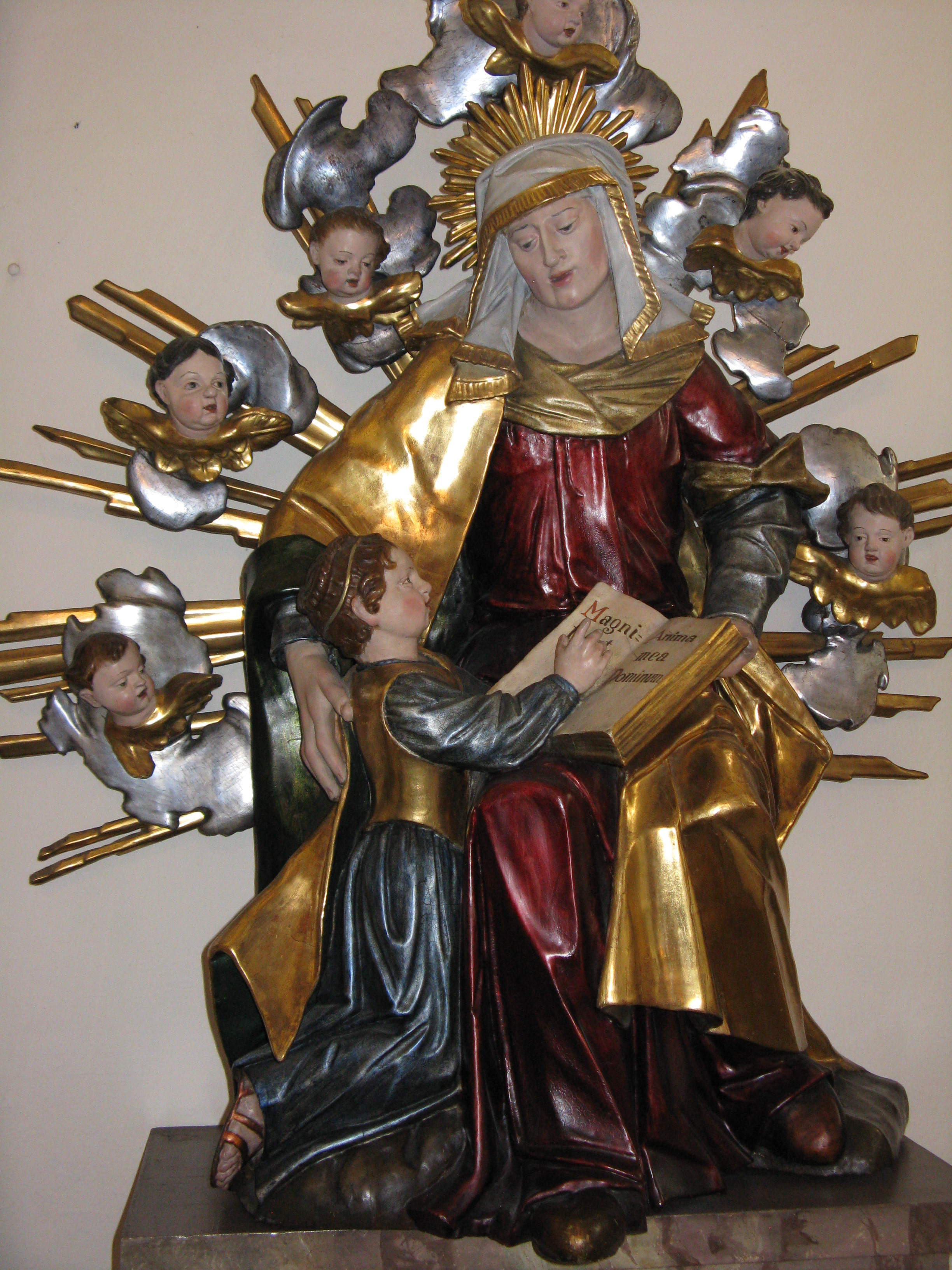 München, Moosach, Alte Pfarrkirche St. Martin, Hl. Anna mit Maria, frühbarocke Figurengruppe, Mitte des 17. Jh.